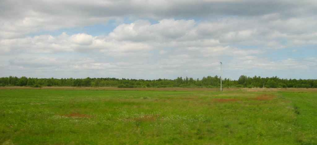 Blick auf den „Ahlbecker Seegrund“, einen verlandeten See zwischen Hintersee und Ahlbeck in der Ueckermünder Heide.